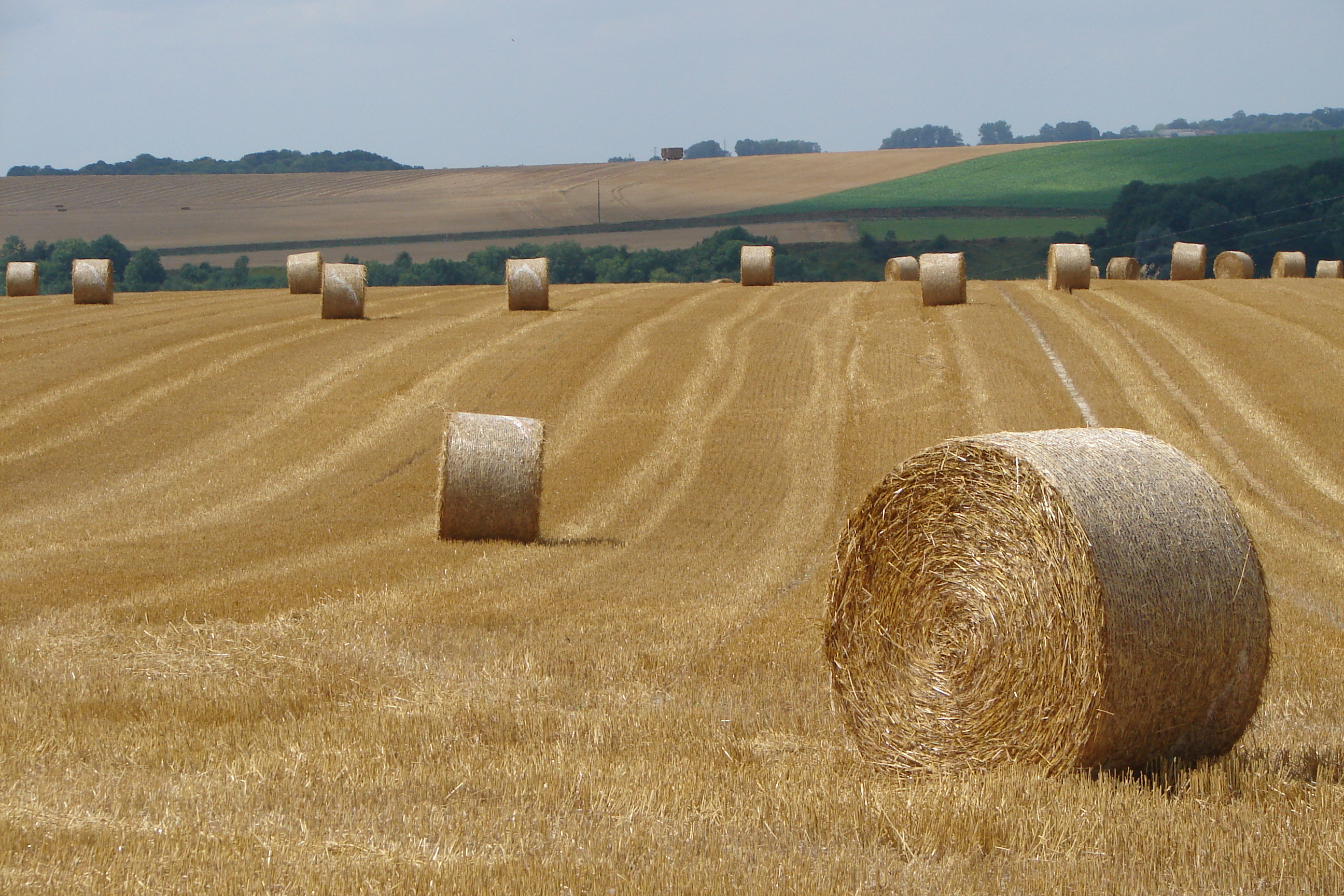 Lieu : Proix (Guise / Aisne / Picardie / France) – Bottes de paille, chaume dans les champs.